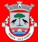 Brasão de Ponte